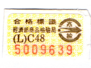 中華民國經濟部商品檢驗局商品檢驗標識 (L)C48 5009639